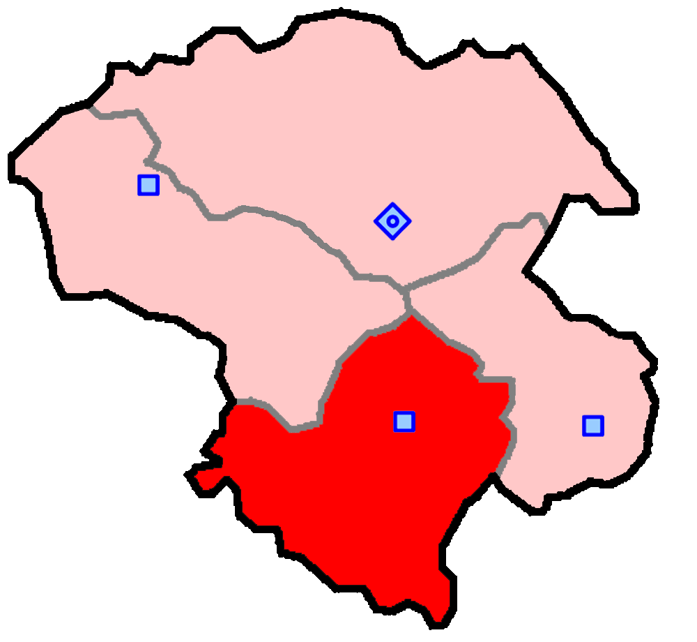 حوزهٔ انتخاباتی خدابنده برای انتخابات مجلس شورای اسلامی